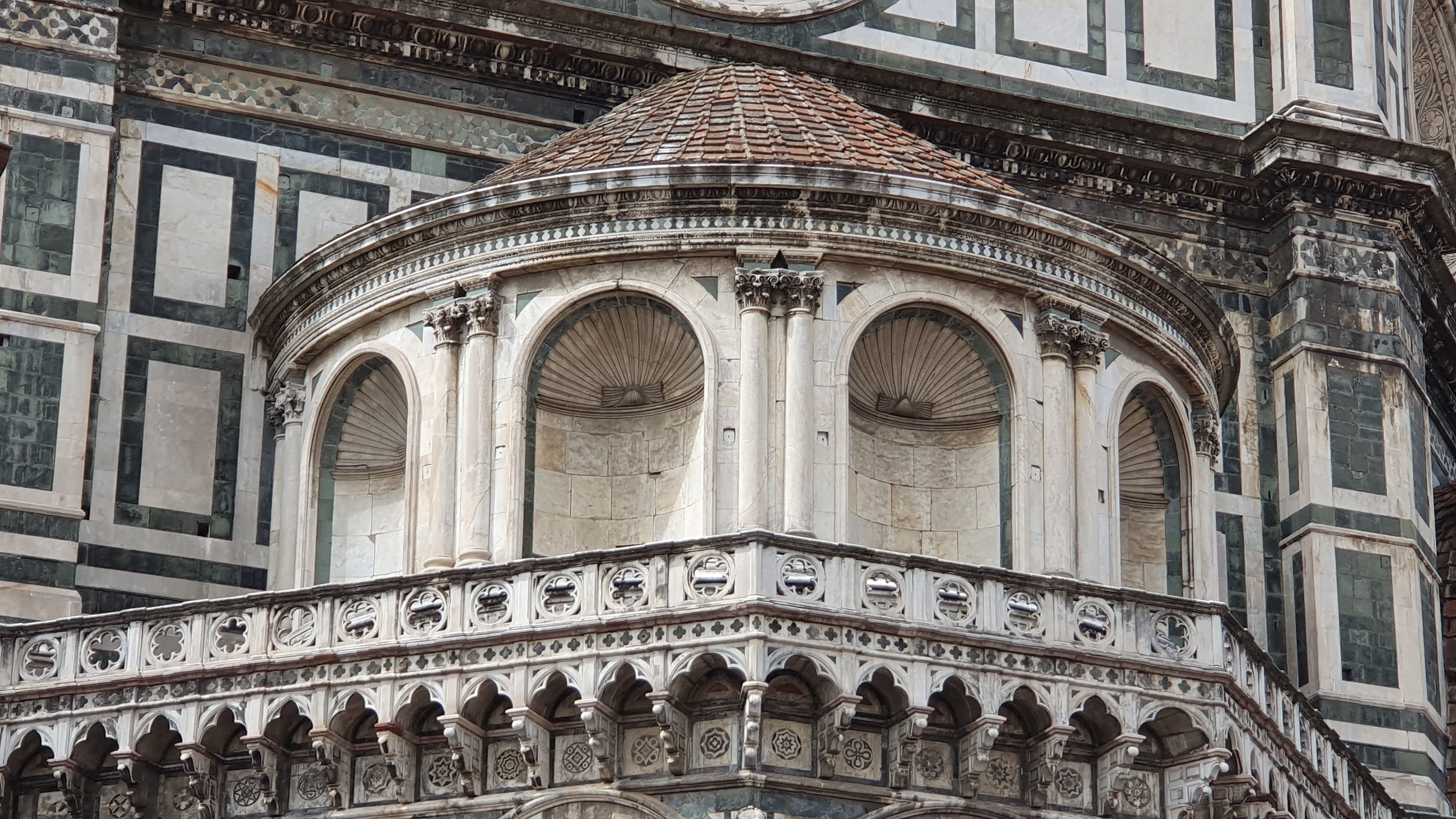 Una delle tribune morte, lato nord - Santa Maria del Fiore